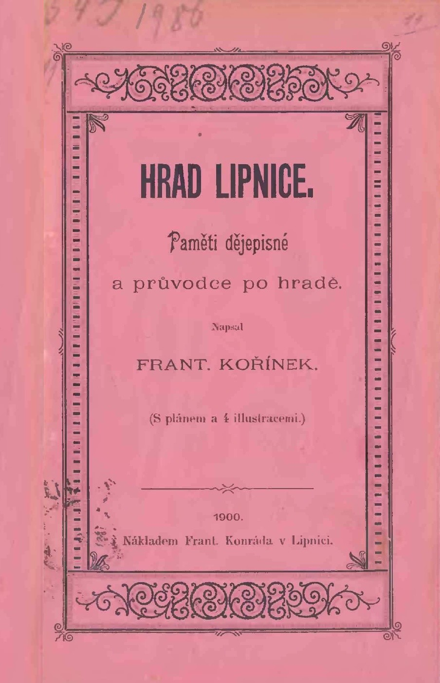 František Kořínek, Hrad Lipnice paměti dějepisné a průvodce po hradě - titulní strana poblikace